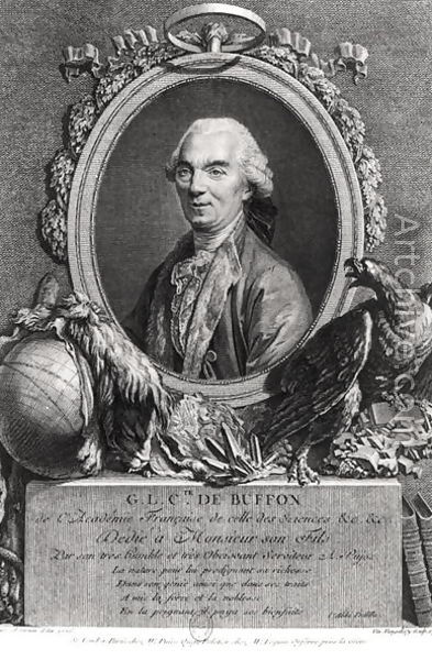 Comte de Buffon in 1777